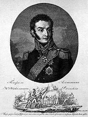 Ο Ραέφσκι και οι γιοί του το 1812